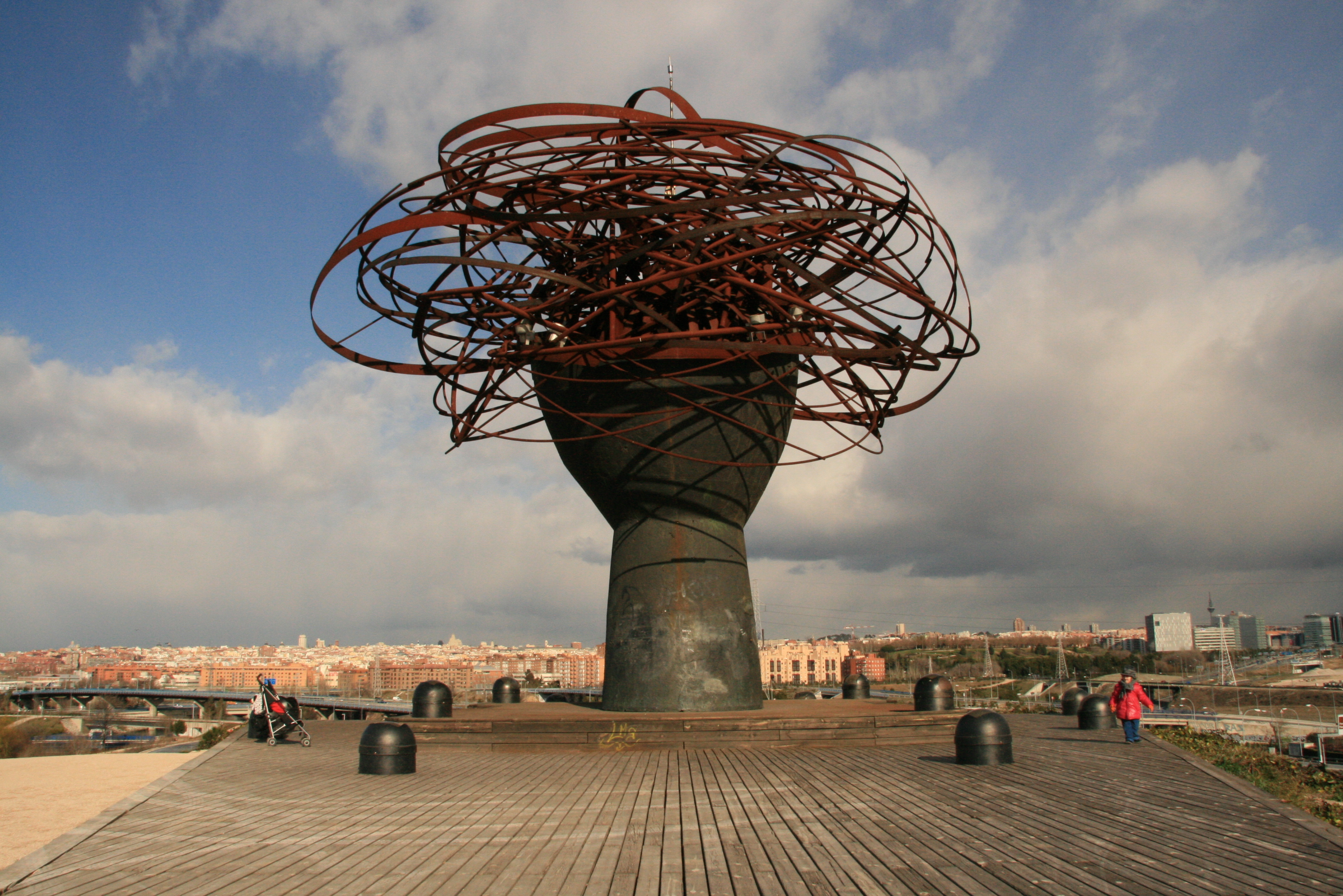 La Dama del Manzanares, escultura situada en el Parque Lineal del Manzanares